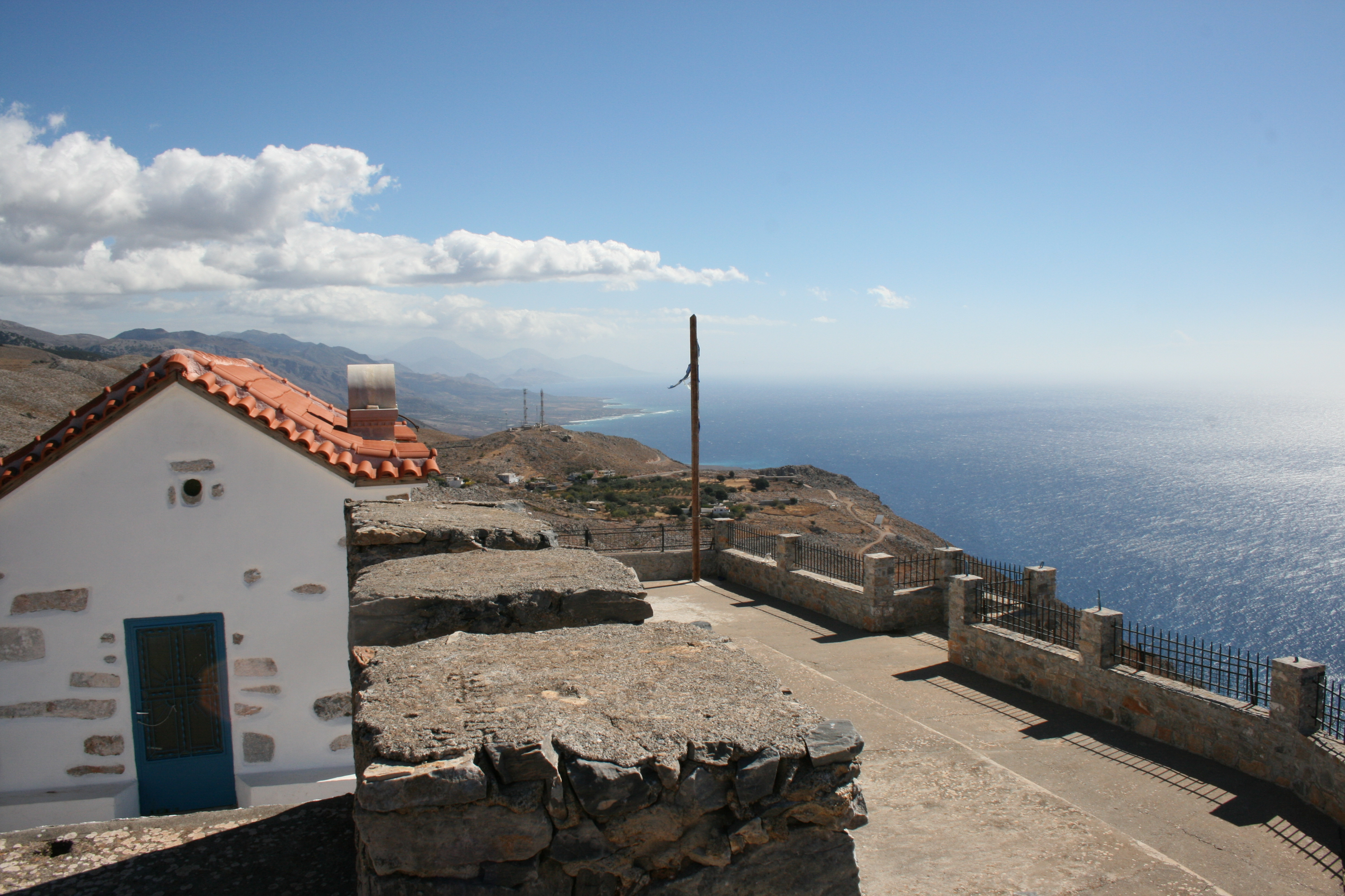 die Kapelle Agia Ekaterini im Ort Anopolis auf Kreta bei Chora Sfakion